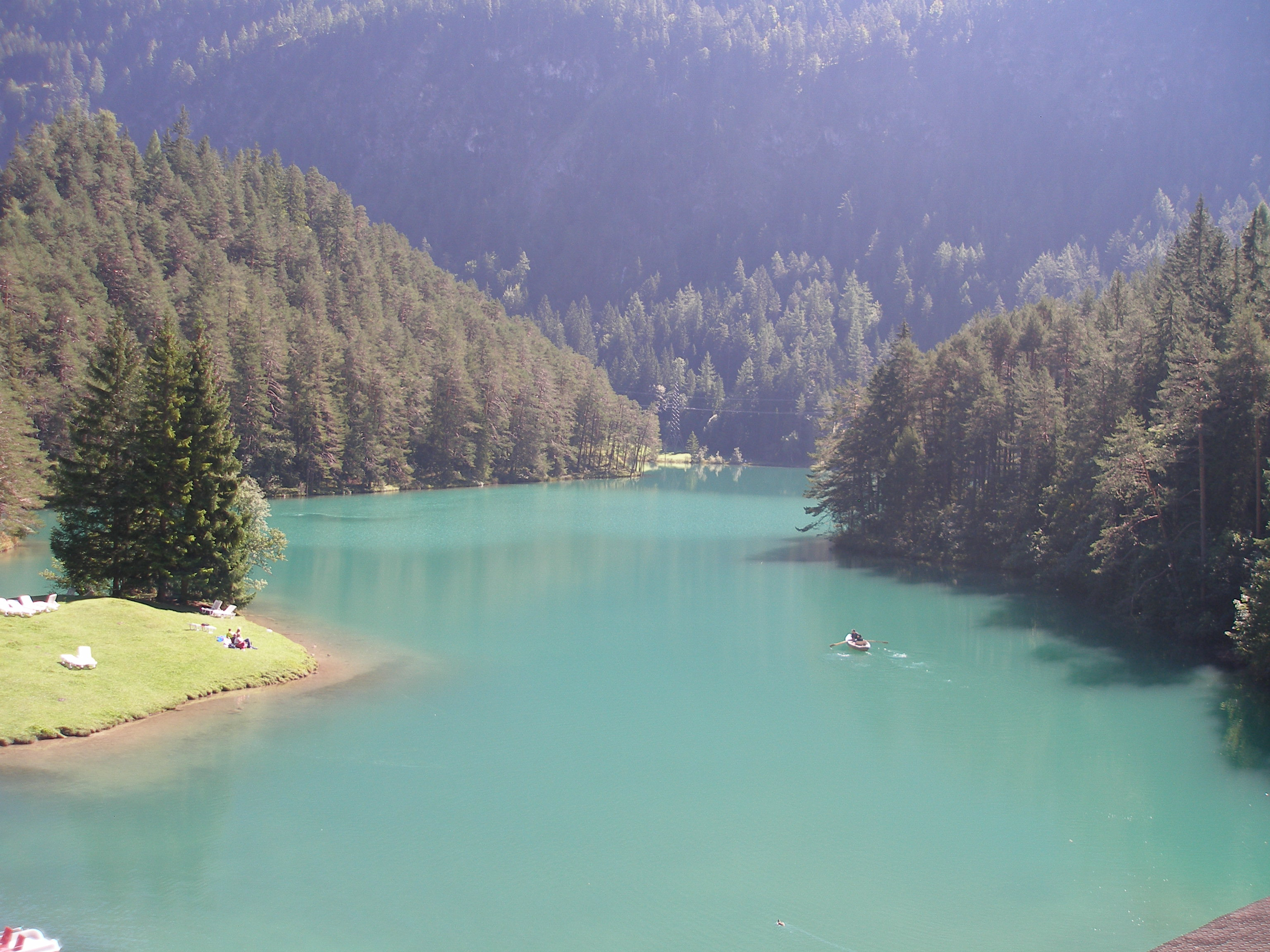 Fernsteinsee